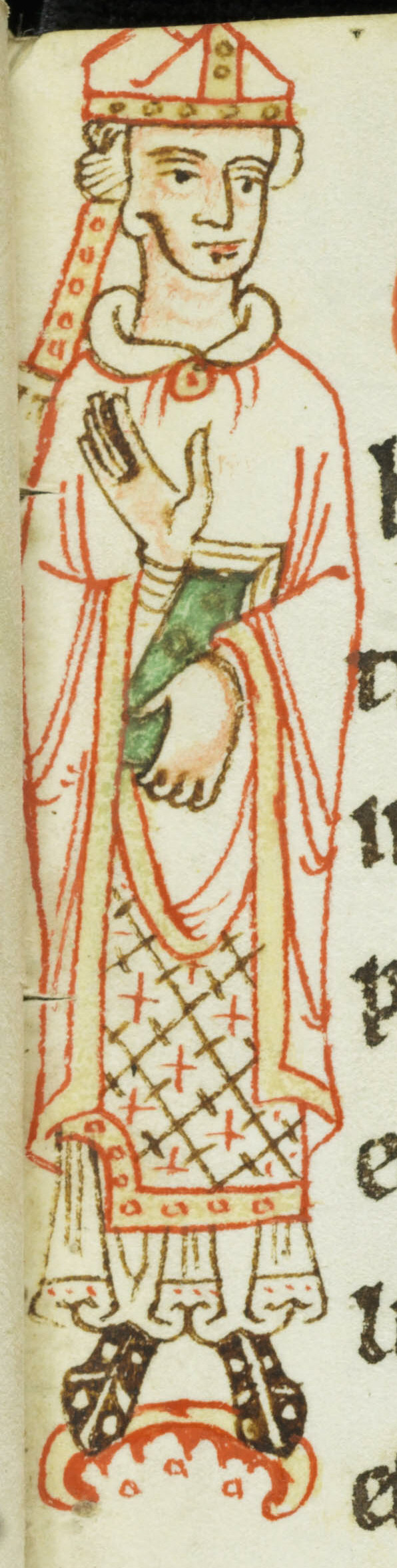 Acta Sancti Petri in Augia; St. Gallen, Kantonsbibliothek, Vadianische Sammlung, VadSlg Ms. 321, S. 23, Innozenz III